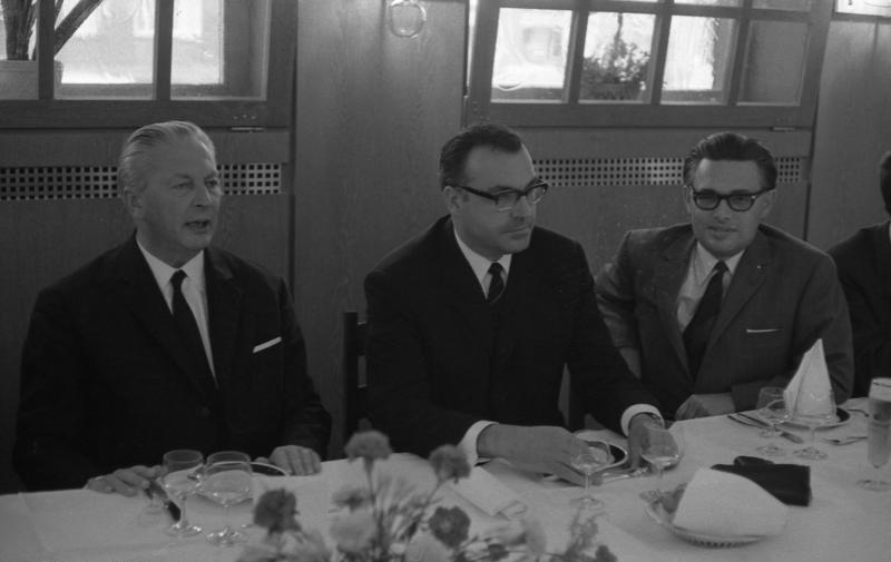 Bundeskanzler Kiesinger auf dem Kommunalkongress der CDU-CSU in Frankfurt/Main (Palmengarten)